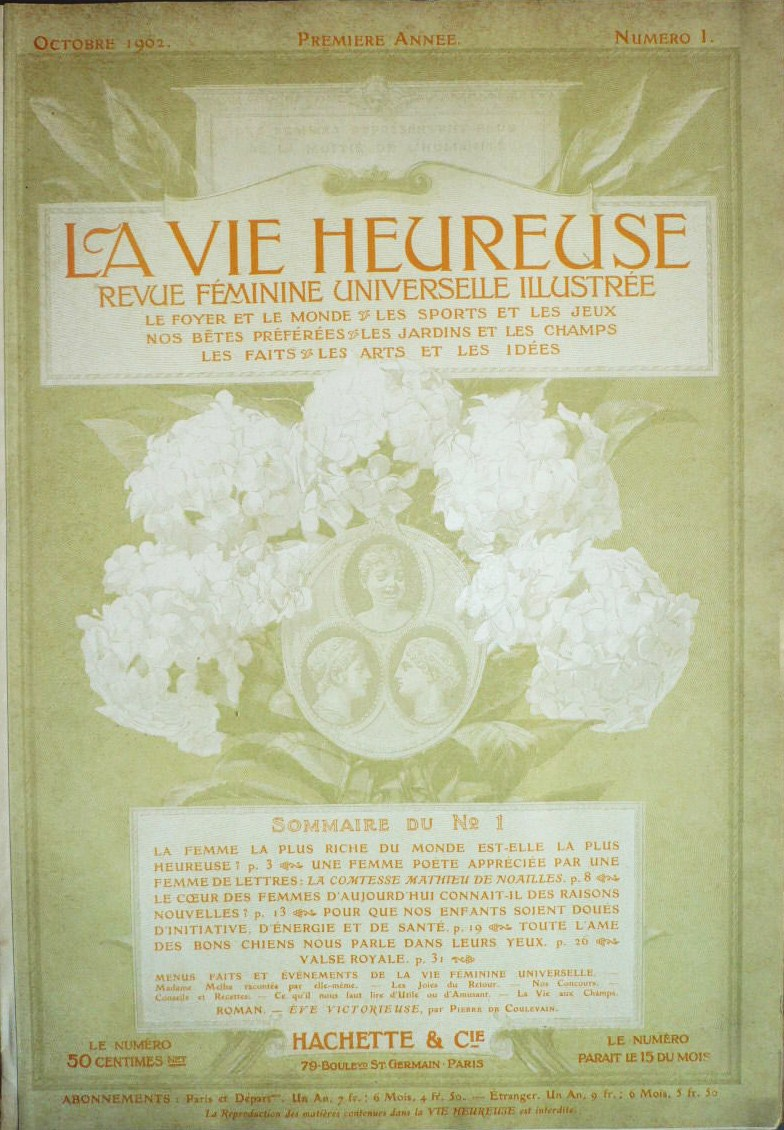 Couverture du no 1 de La Vie heureuse, revue féminine publiée par Hachette.